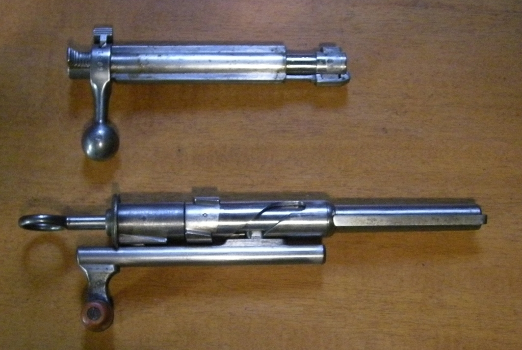 G89 K 93Verschluss CH